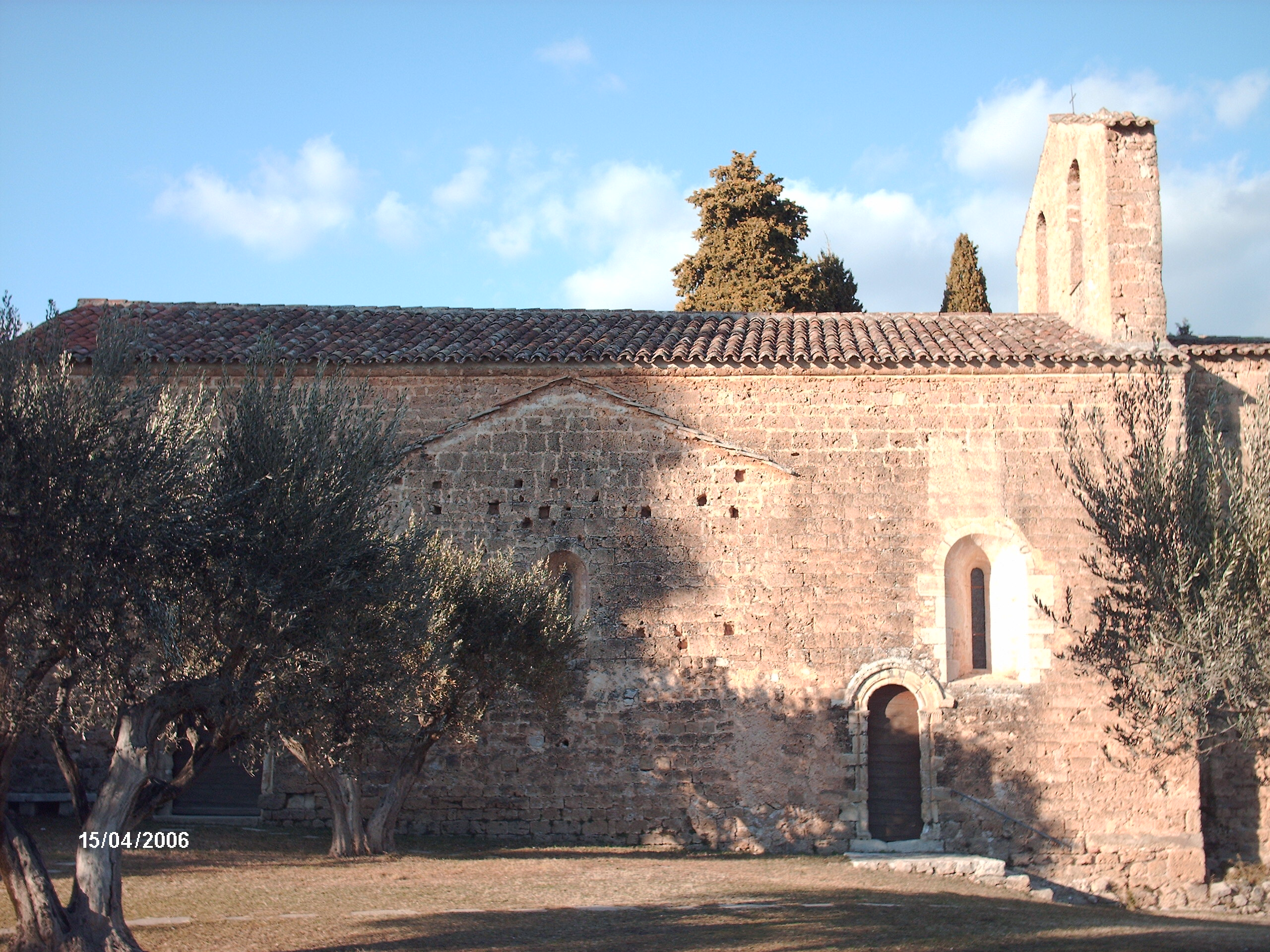 Chapelle du 11ème siècle inscrite à l'inventaire supplémentaire des monuments historiques. A proximité du cimetière communal